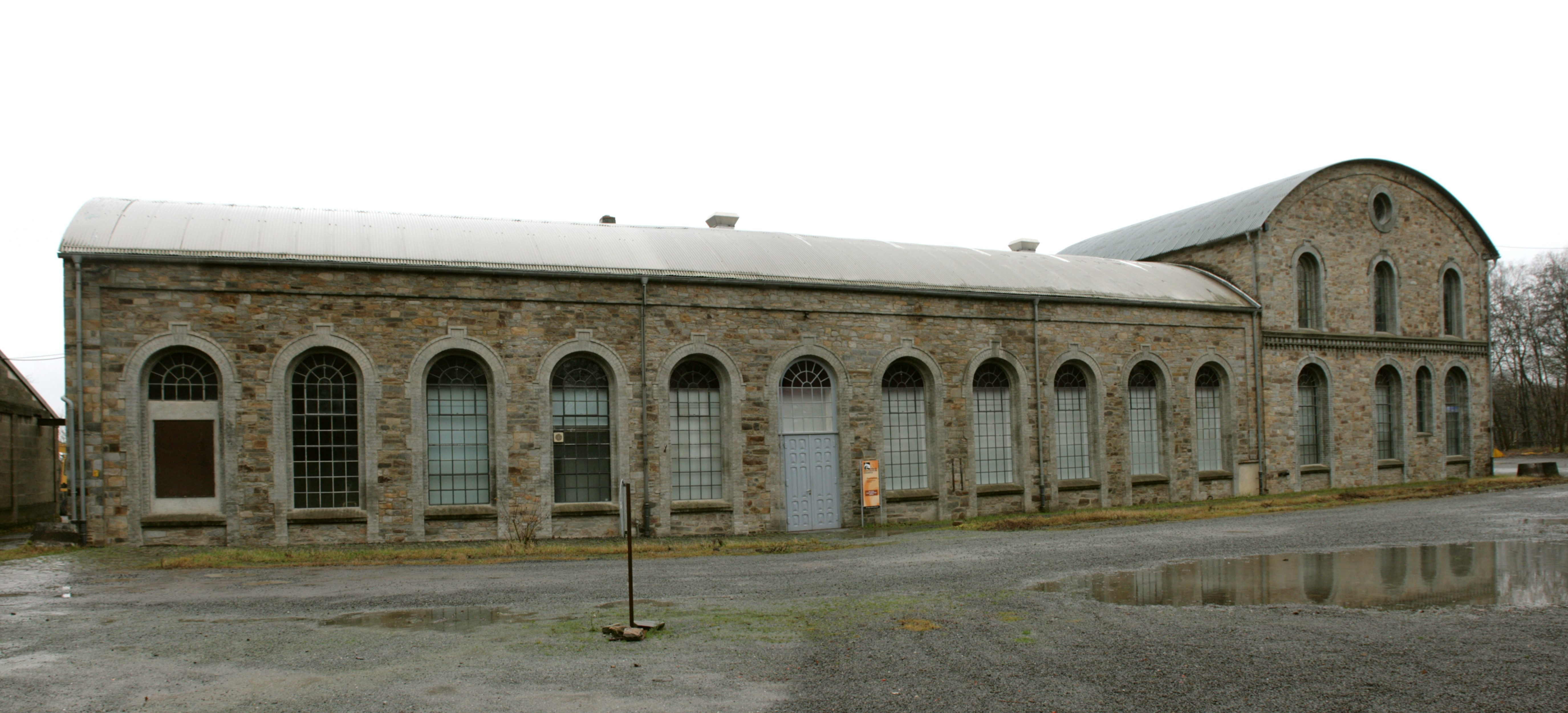 Museum Industriekultur in Osnabrück